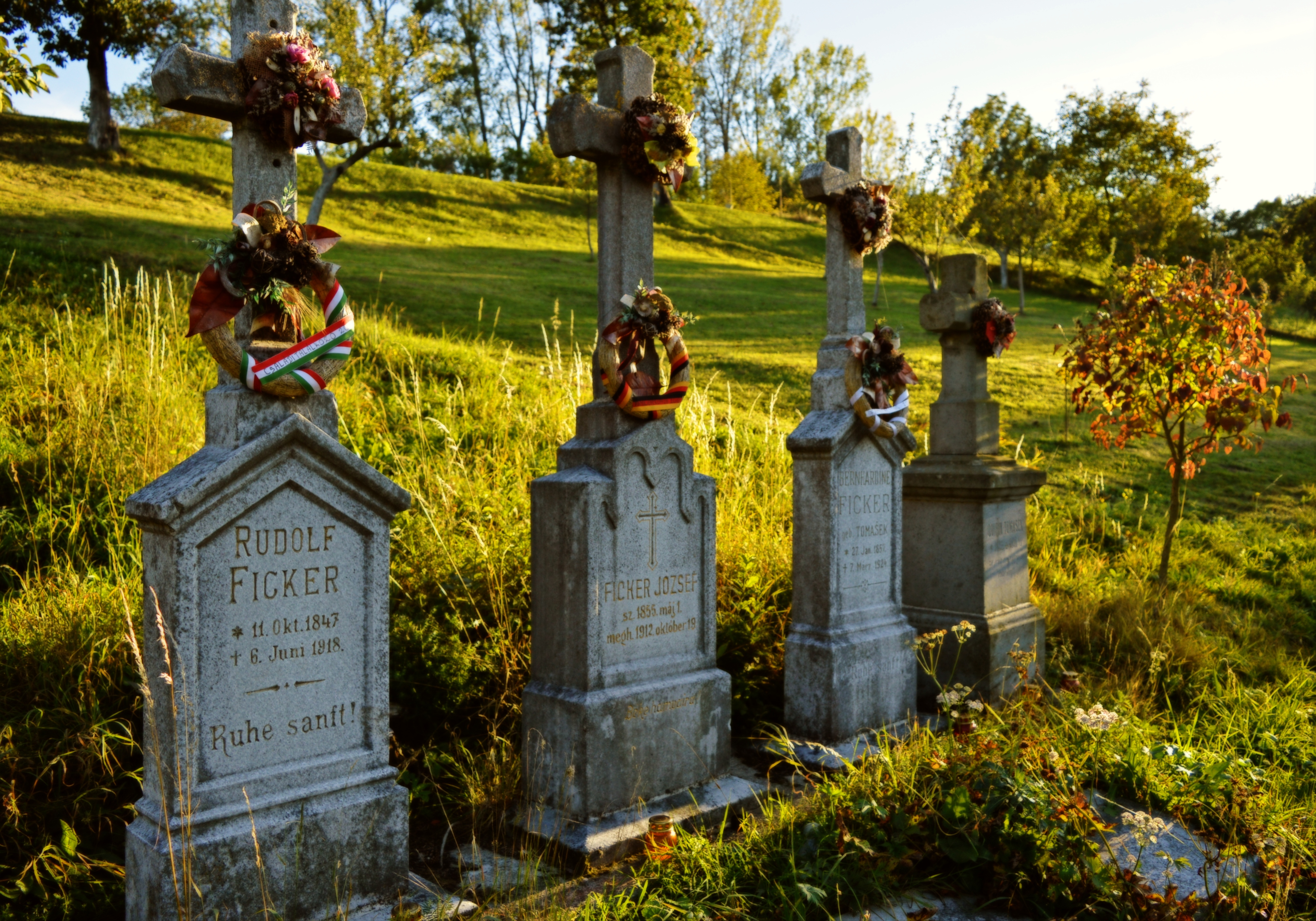 Pomníky rodiny Fickerovcov nachádzajúce sa za kostolom sv. Kozmu a Damiána.